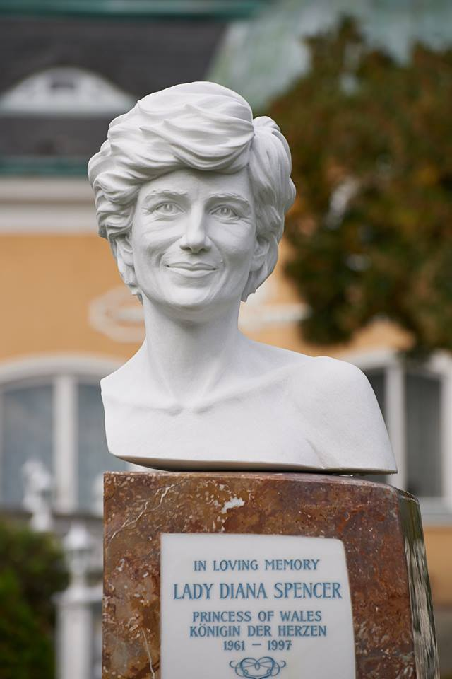 Lady Diana - Denkmal